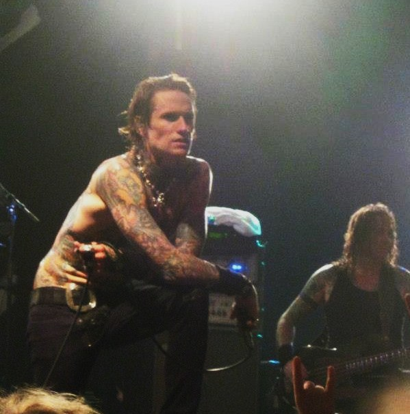 Buckcherry-Konzertfoto